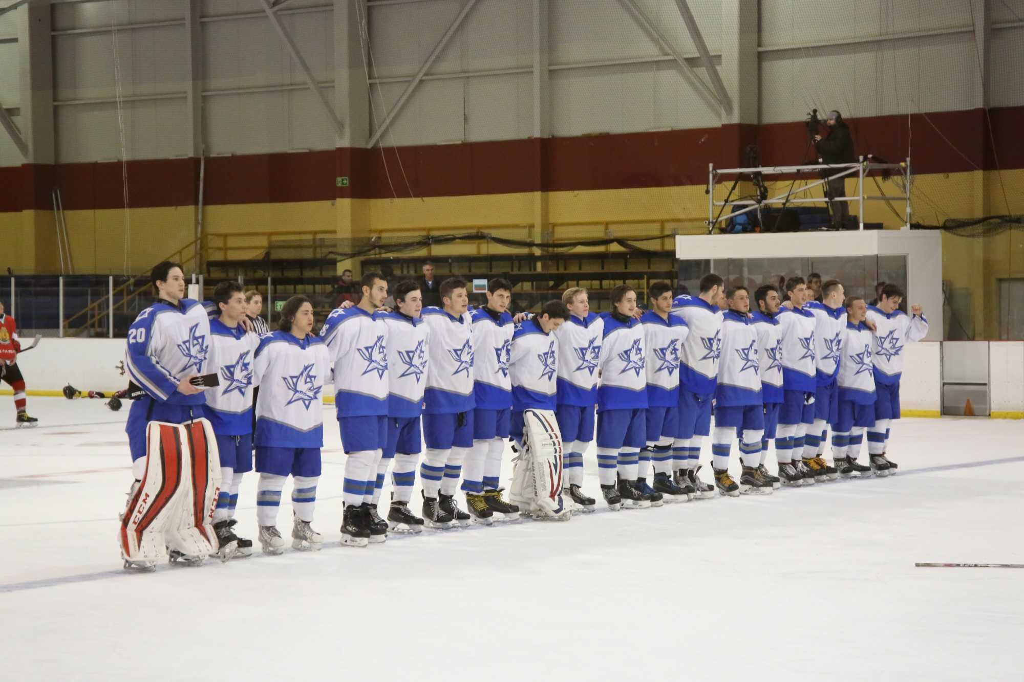 IIHF U20 Div 3 2017 Israel v Bulgaria